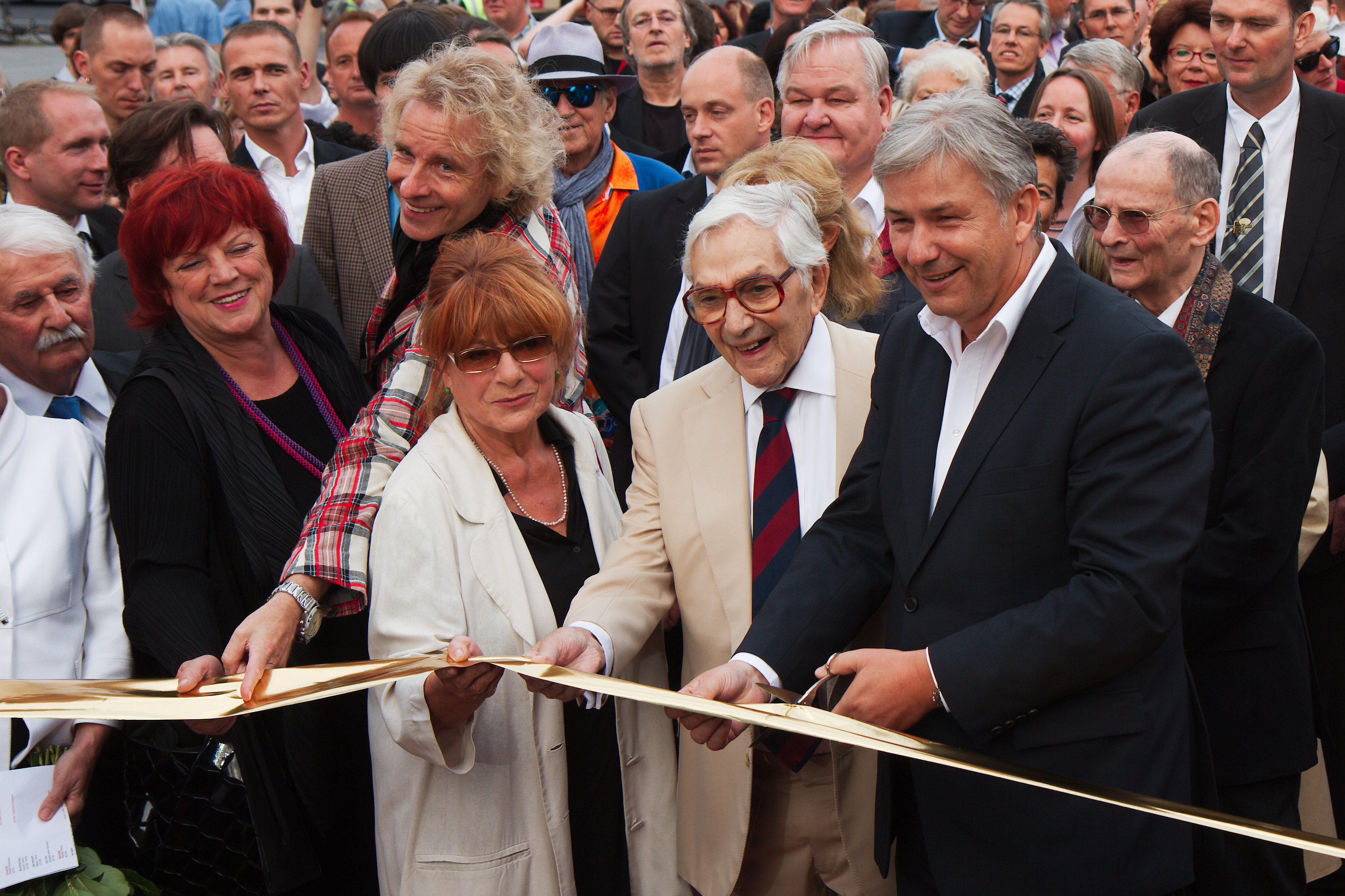 Thomas Gottschalk und Klaus Wowereit bei der Eröffnung des Boulevard der Stars in Berlin